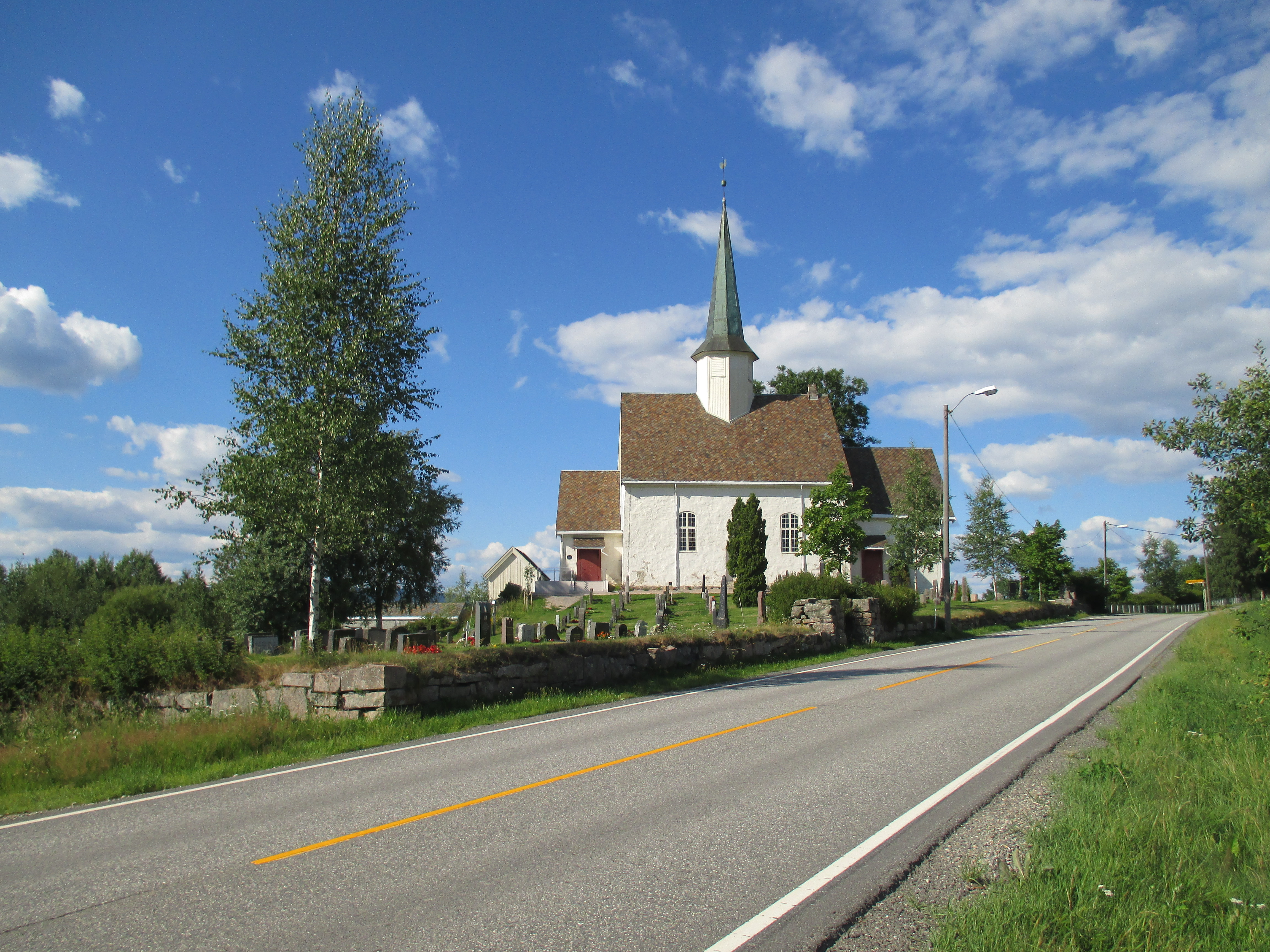 Primær fylkesvei 120 ved Nannestad kirke